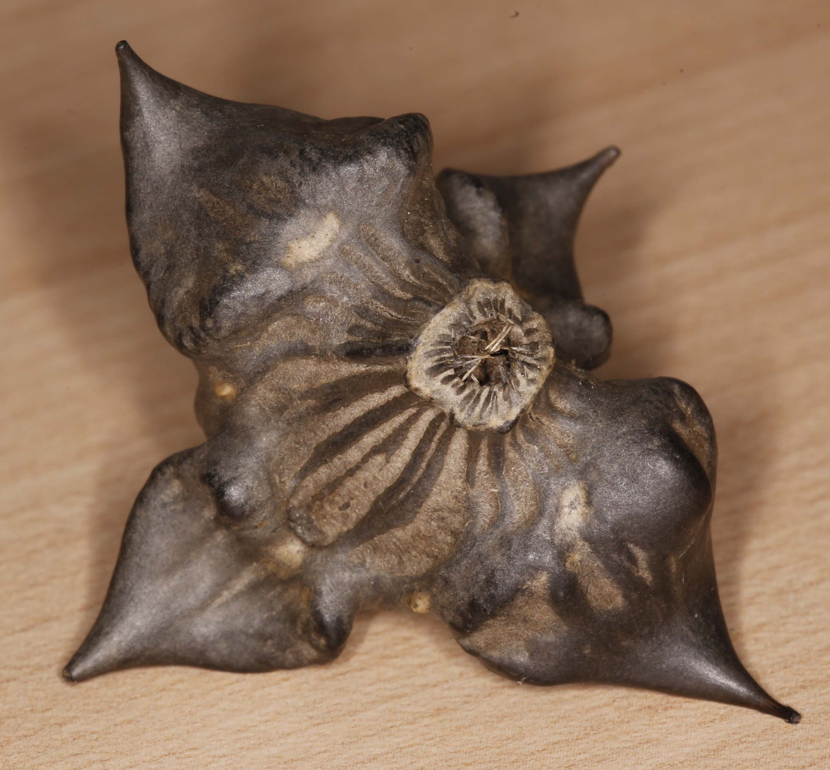 Frutto trovato sulle rive del Lago Annone (LC)